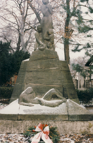 Kriegerdenkmal von Hans Walther in Straußfurt